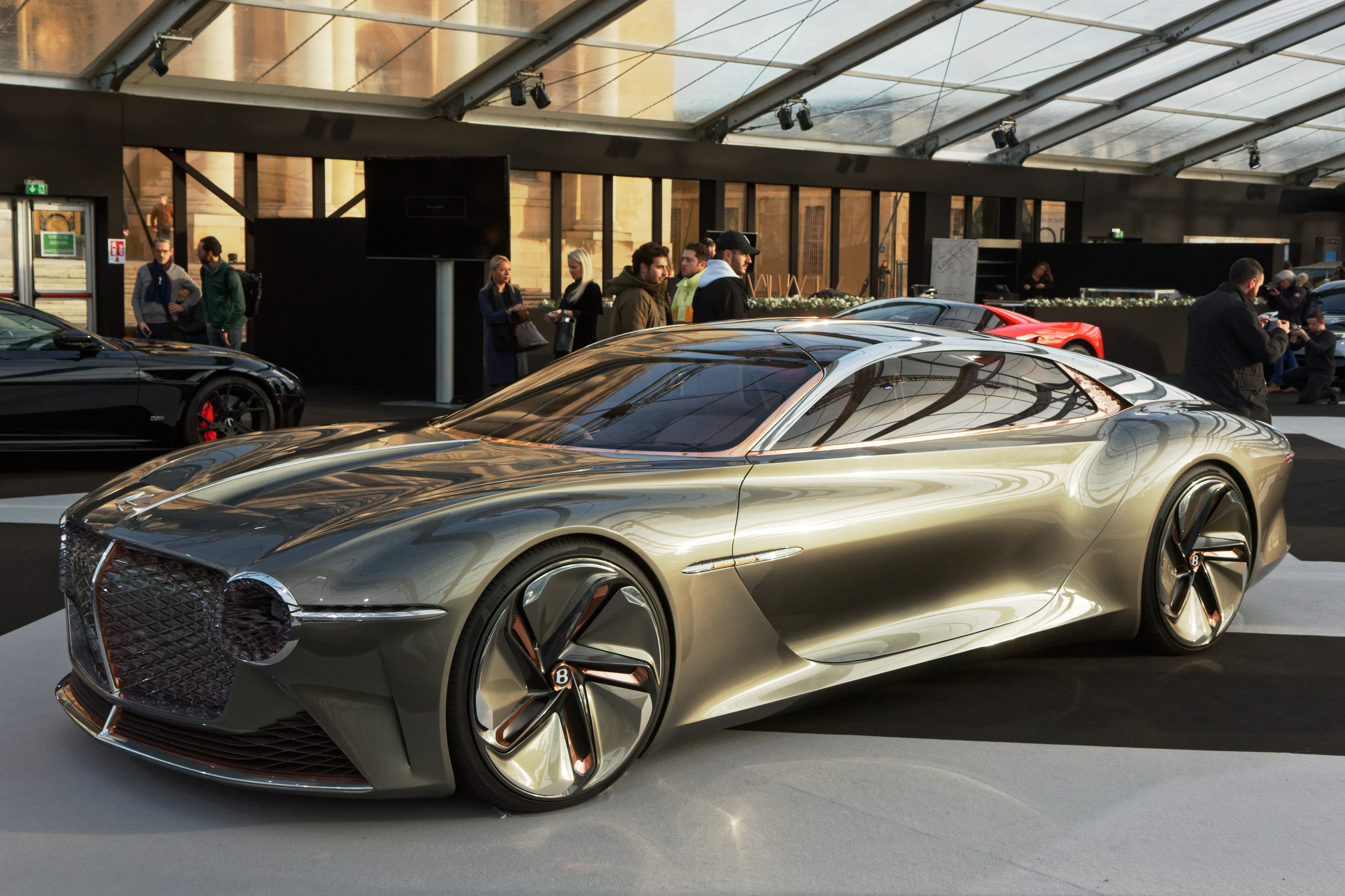 Une Bentley EXP 100 GT exposée lors du festival automobile international 2020